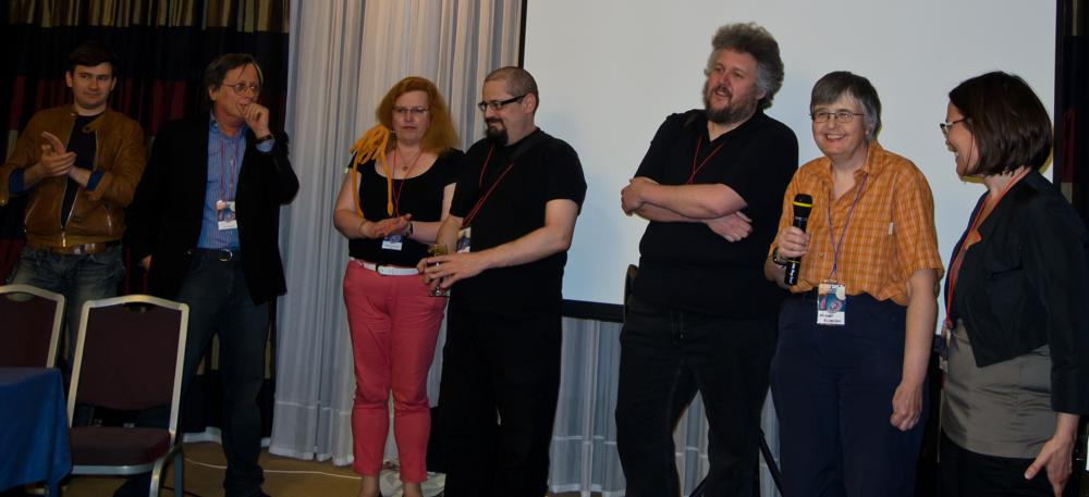 otvorenje konvencije Kontakt, koja spaja ovogodišnji 34. SFeraKon i 34. Eurocon u Zagrebu